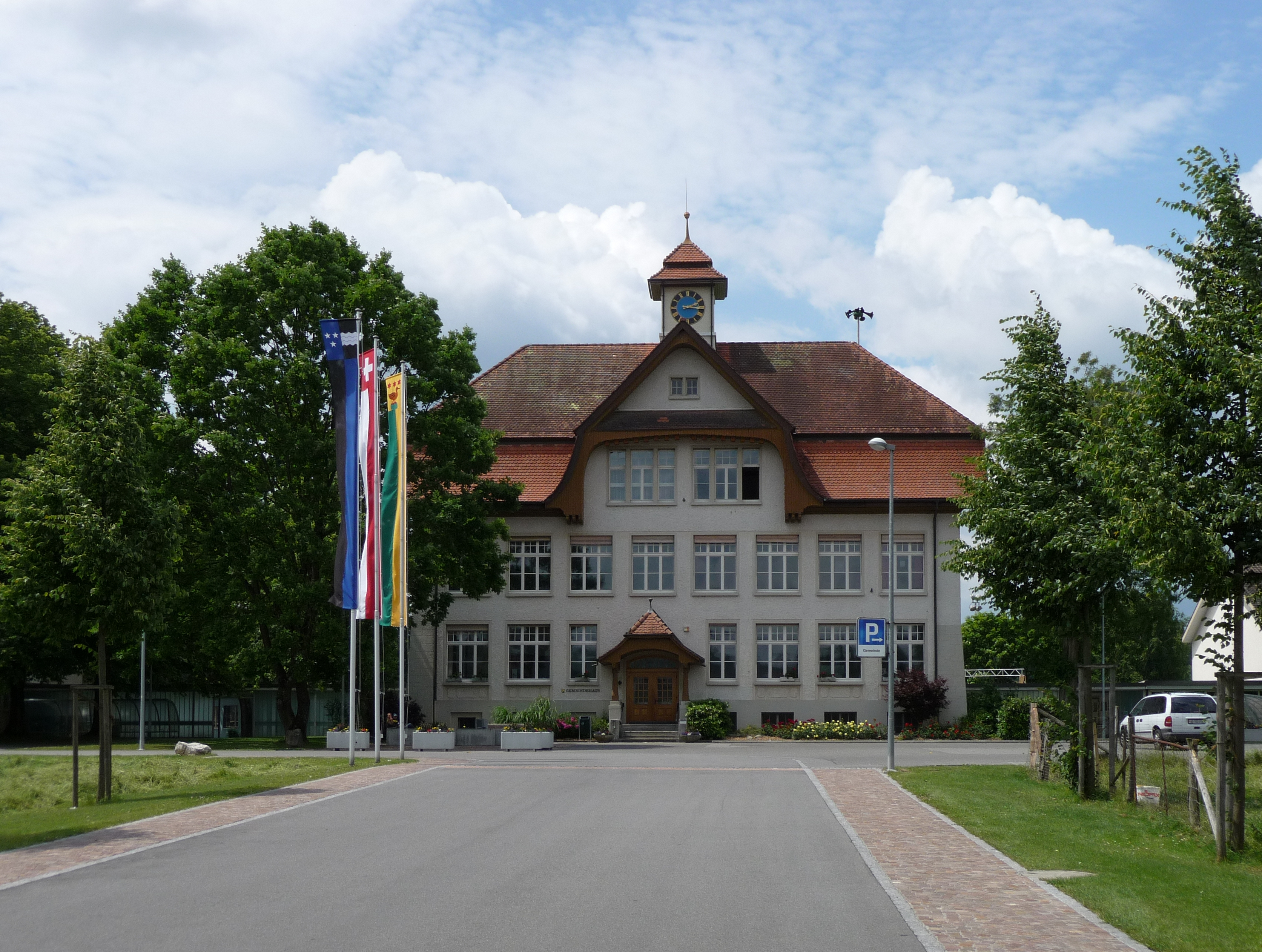 Gemeindehaus in Unterentfelden